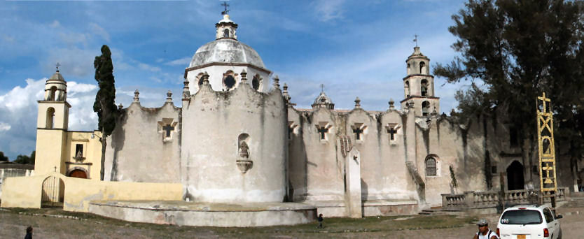 Santuário de Atotonilco, San Miguel Allende, Guanajuato, México